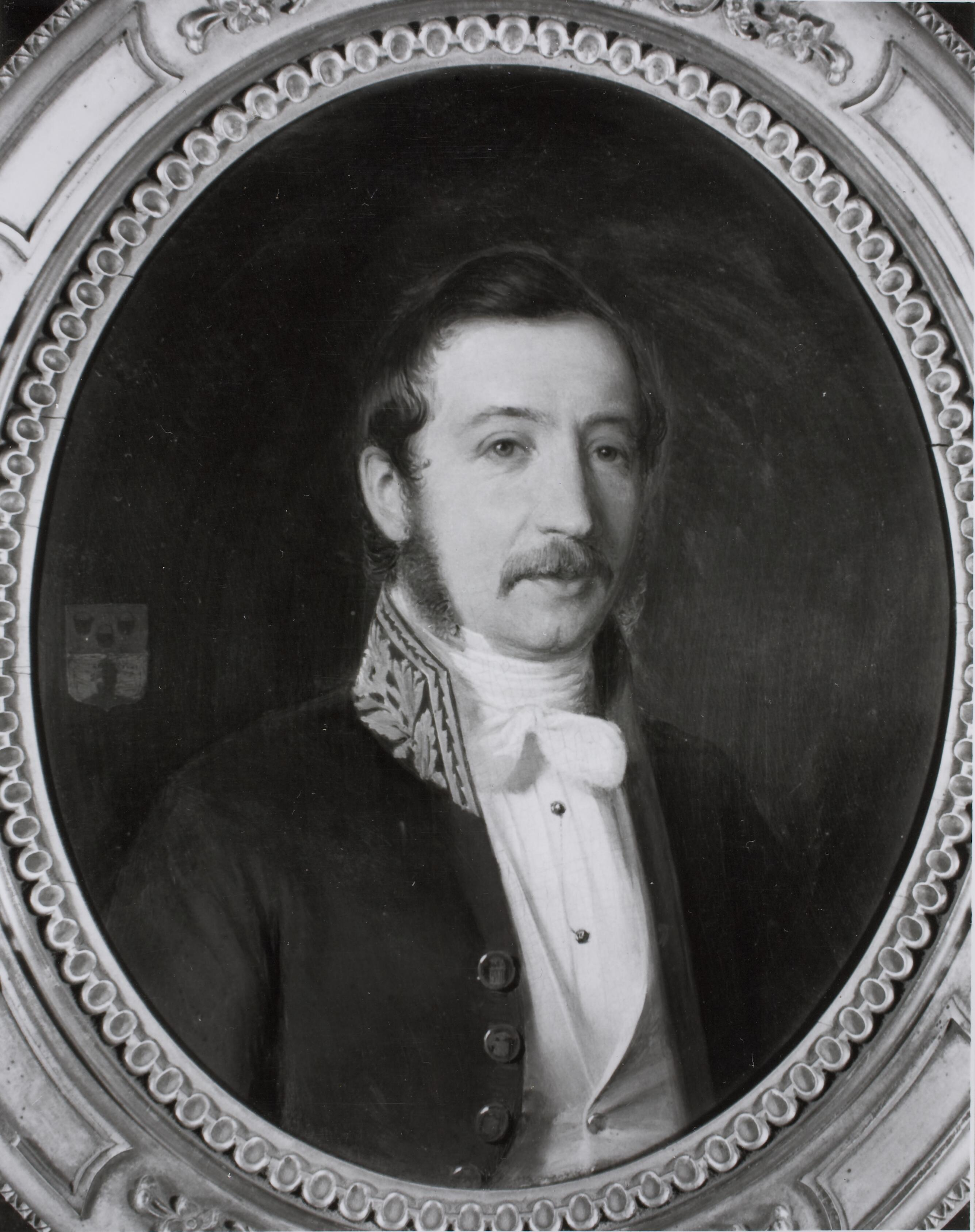 Portret van Gustaaf Eugenius Gijsbert Constant Karel Dommer van Poldersveldt (1817-1862)